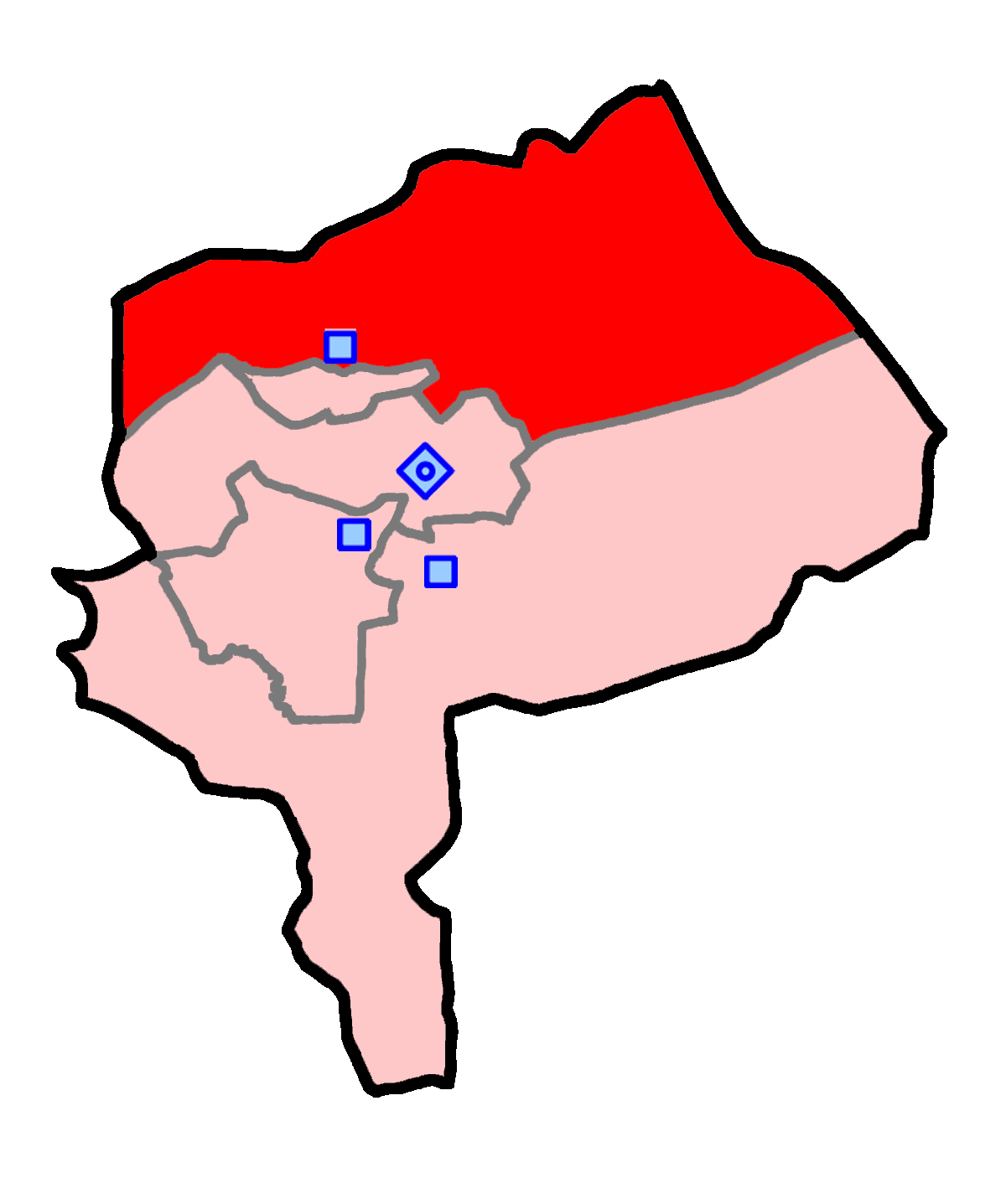 حوزهٔ انتخاباتی اردکان برای انتخابات مجلس شورای اسلامی